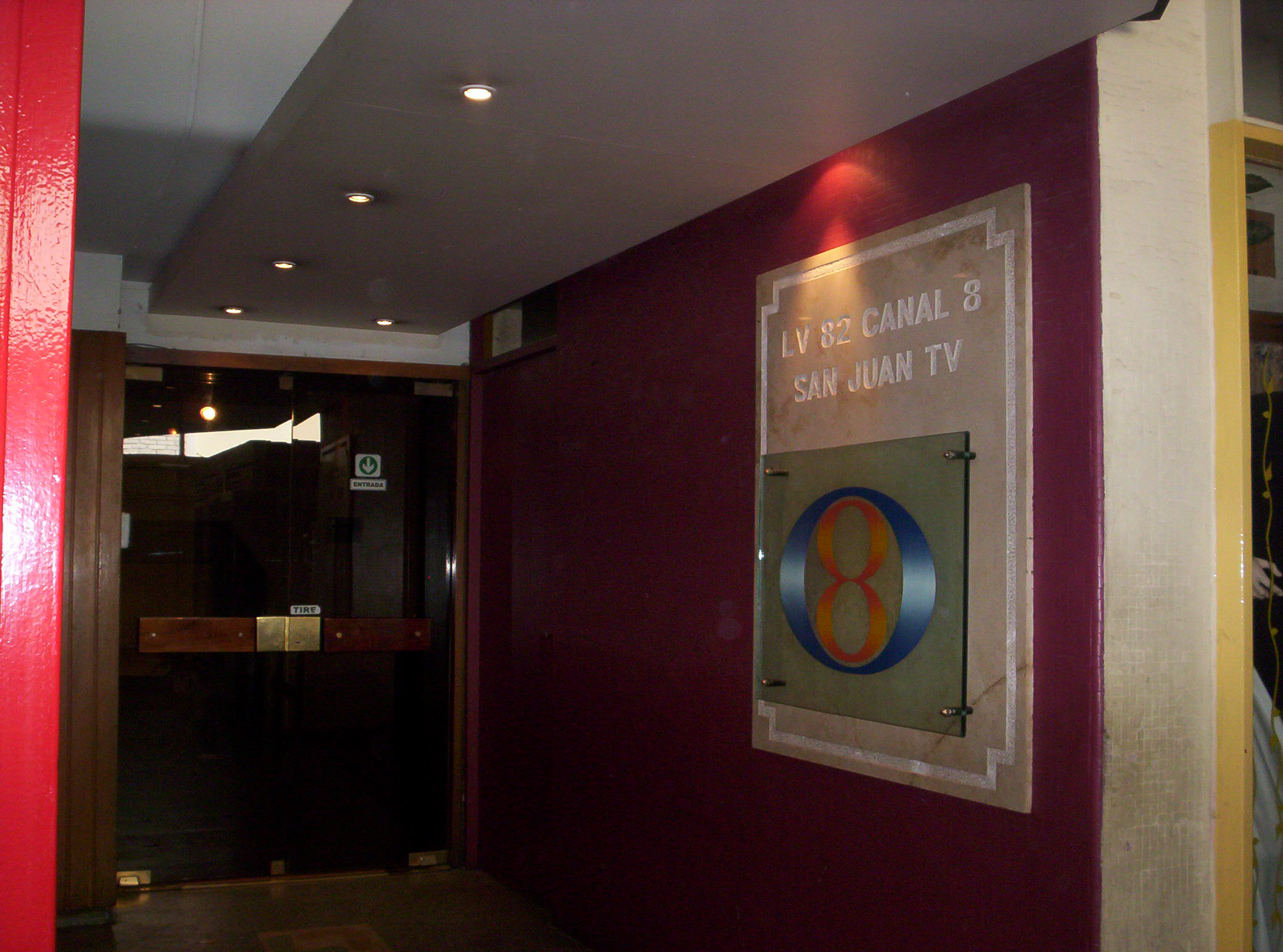 Fotografía de la entrada de los estudios de Canal 8 de televisión en la Ciudad de San Juan, provincia de San Juan, Argentina